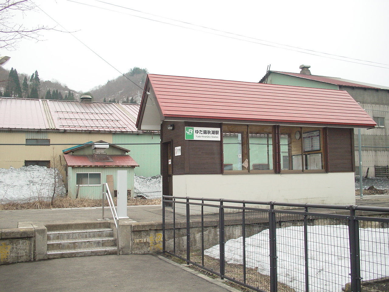 （ゆだ錦秋湖駅）